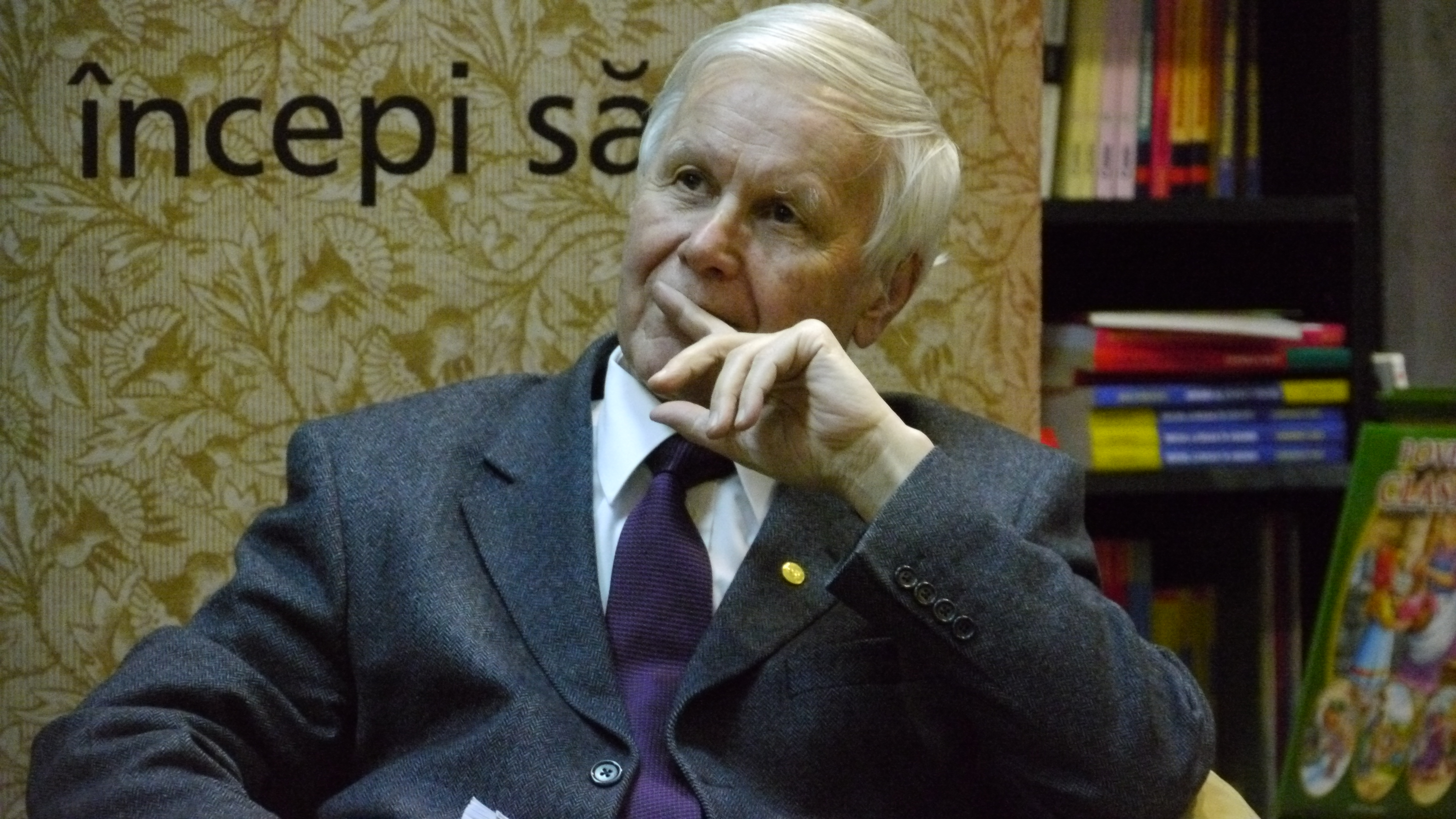 Eugen Simion. Sala Dalles, Ora 19:00, 9 martie 2011, lansare Lyrica magna (Eseu despre poezia lui Nichita Stănescu), Editura Curtea Veche, 2010 de Daniel Cristea-Enache.